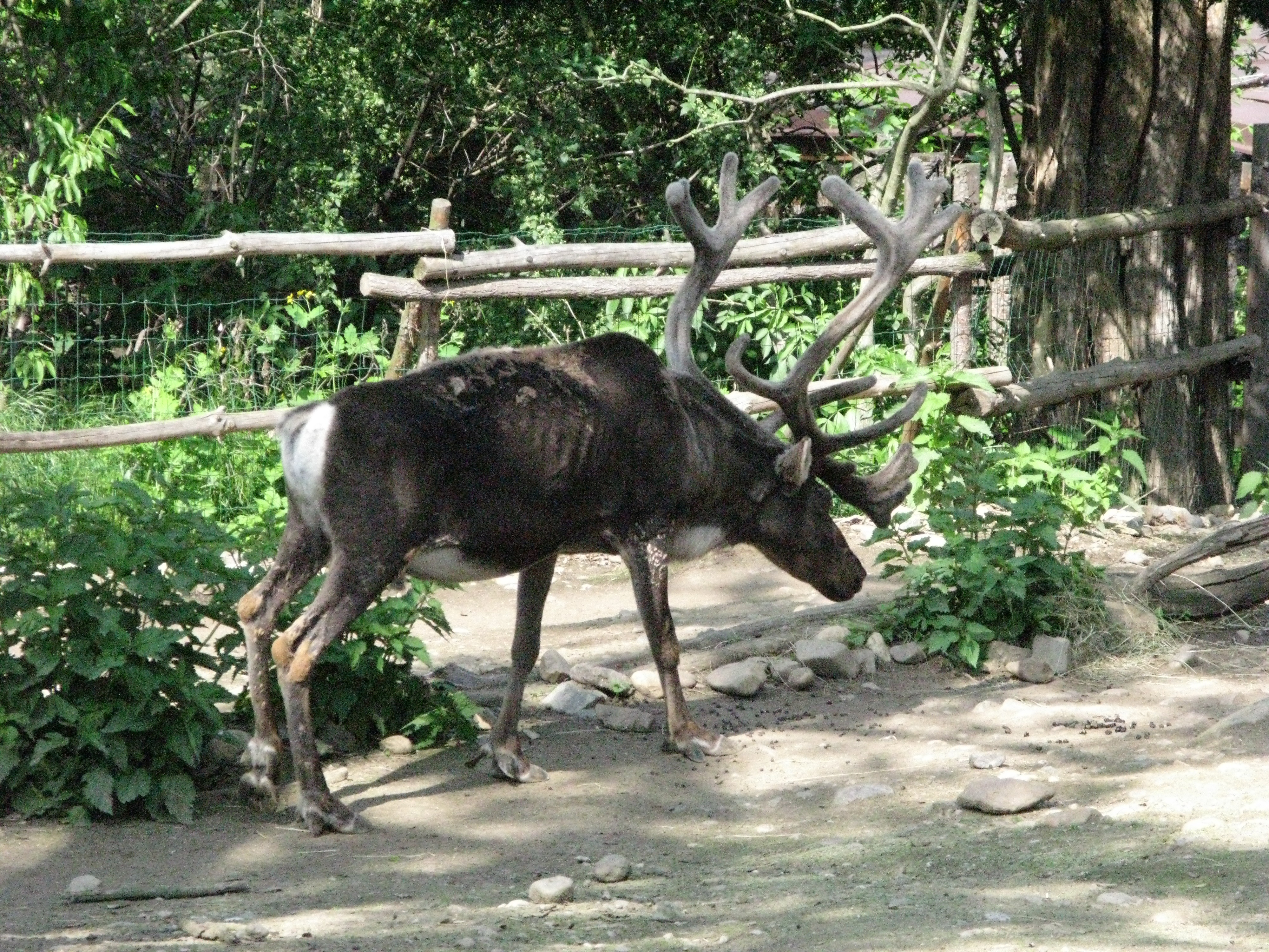 Renne des forêts eurasiennes (rangifer tarandus fennicus), zoo de Prague.